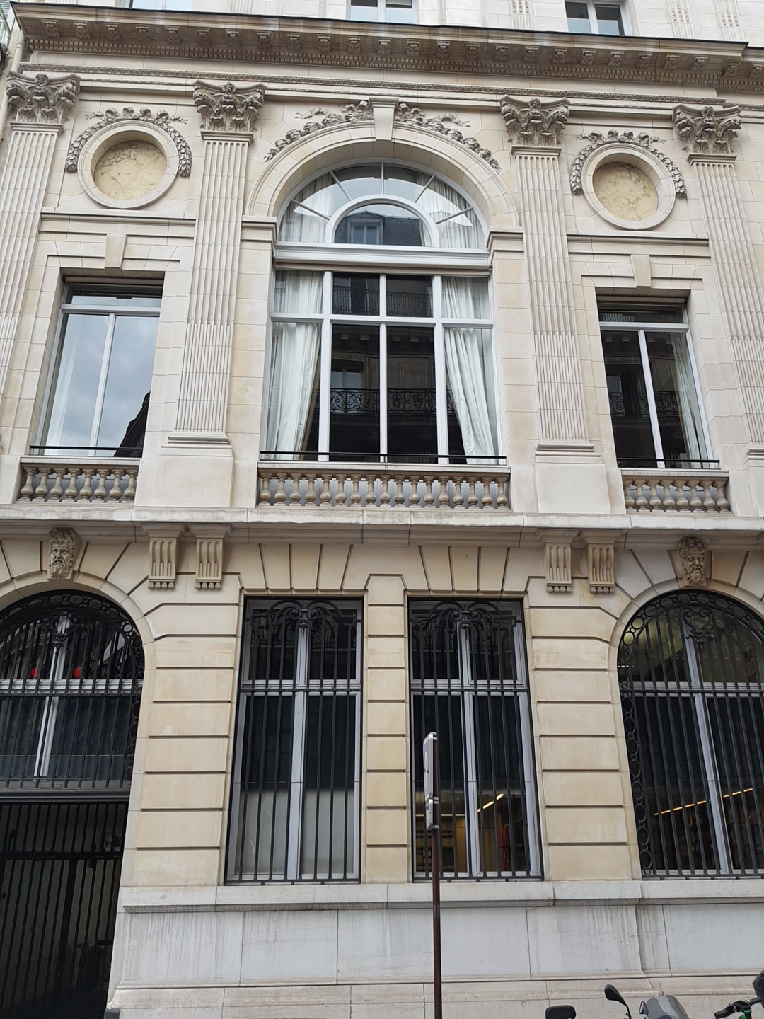 4 rue de la Ville-l'Evêque Paris